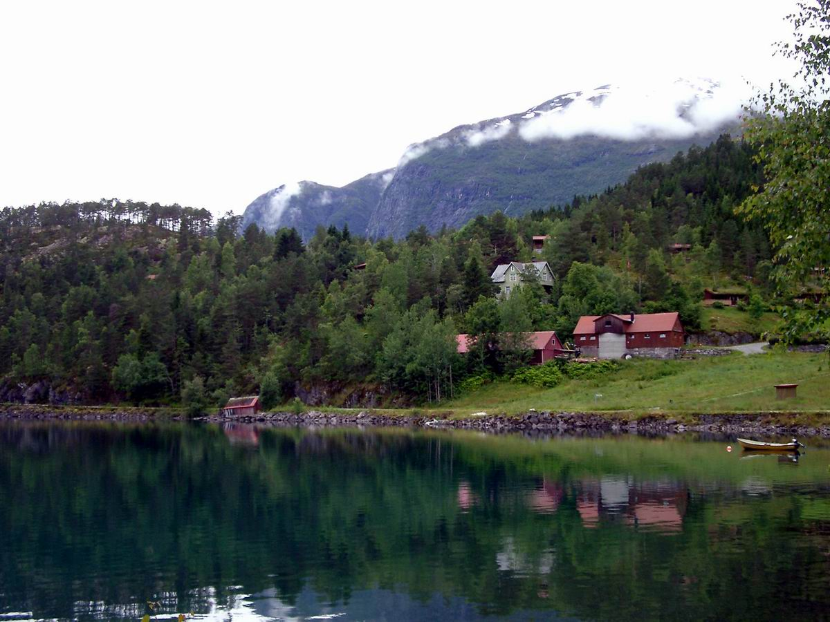 Loenvatnet Norwegen